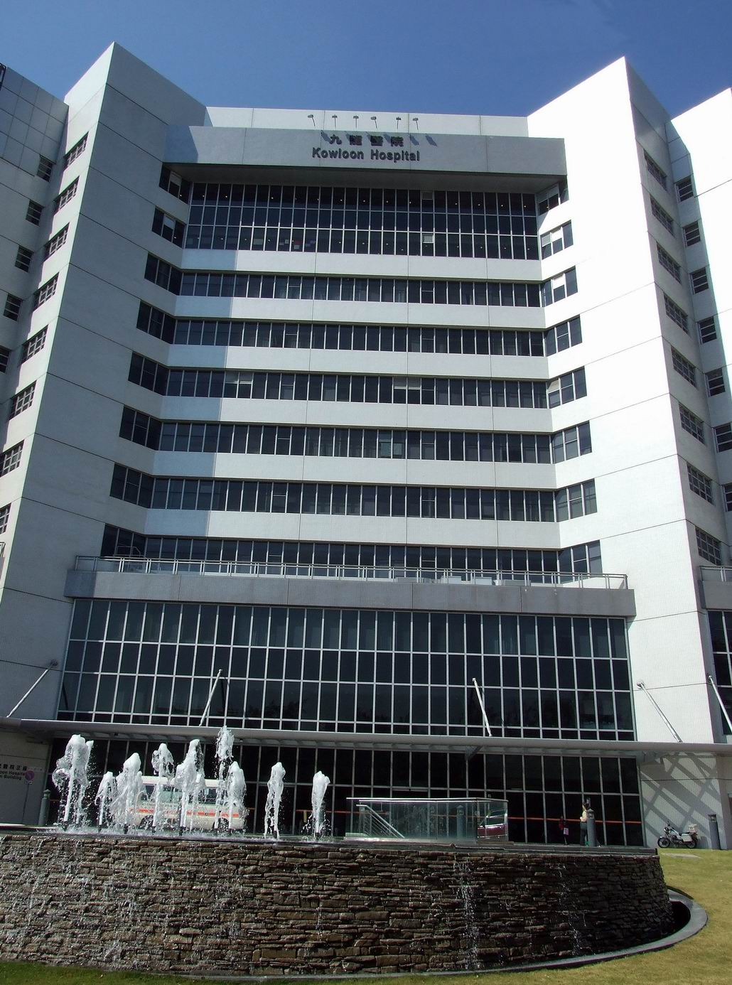 中文（香港）: 九龍醫院正座大樓